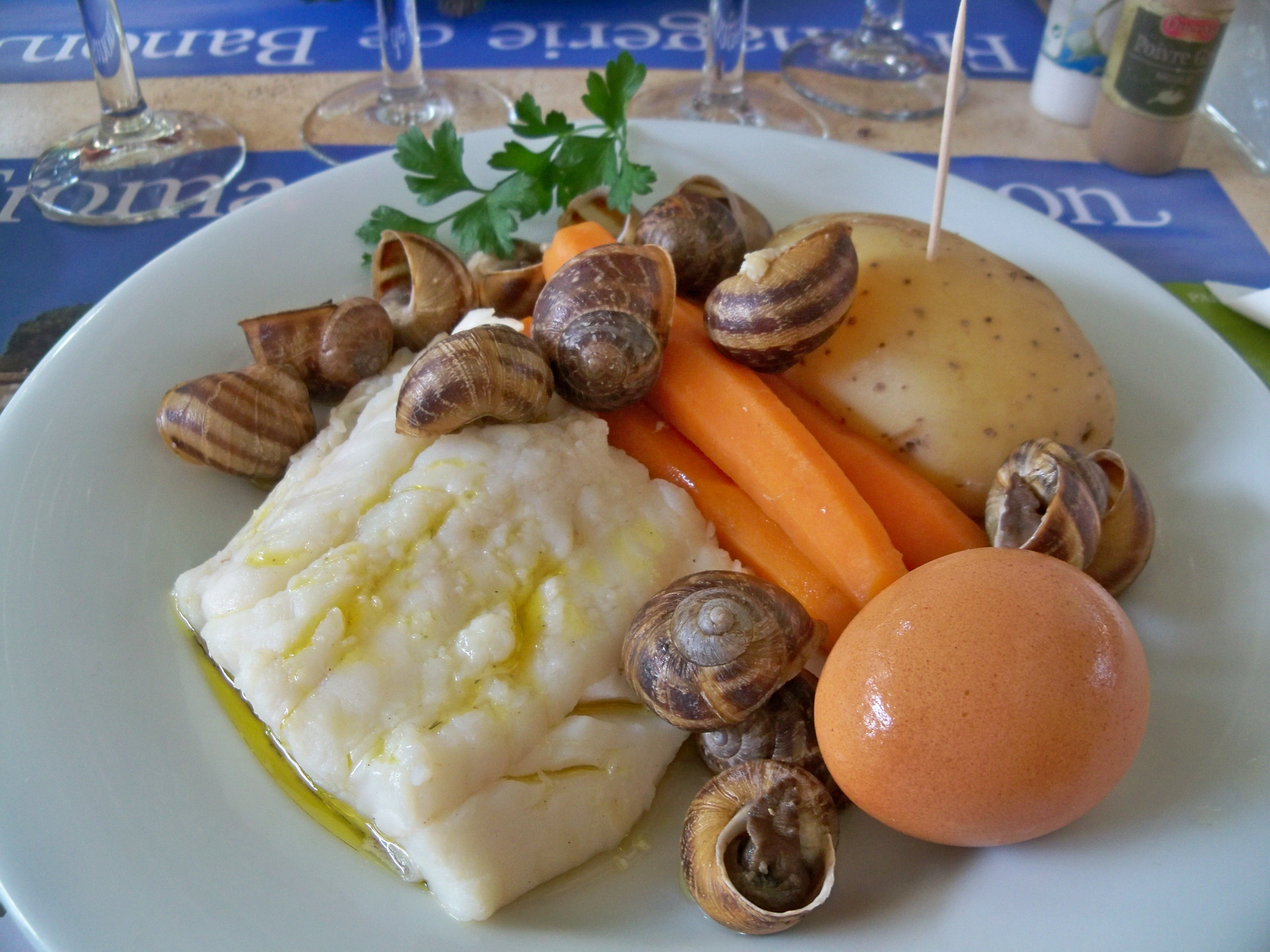 aïoli au Bistrot de pays d'Oppède